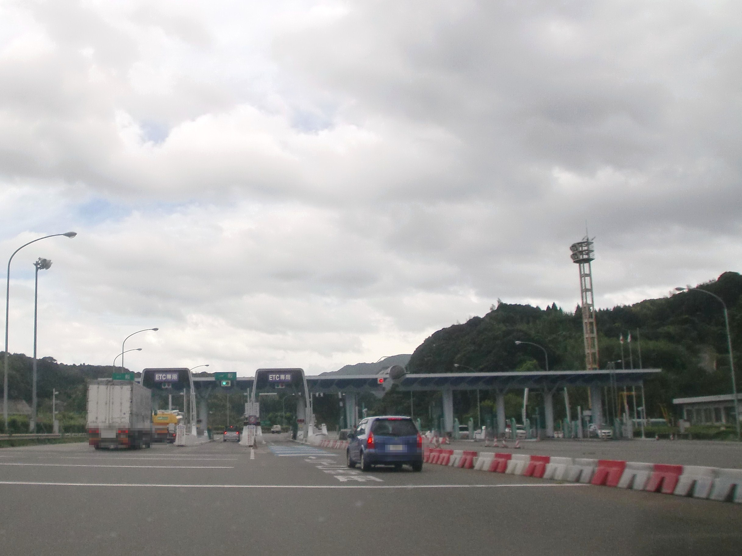 鹿児島本線料金所の外観。